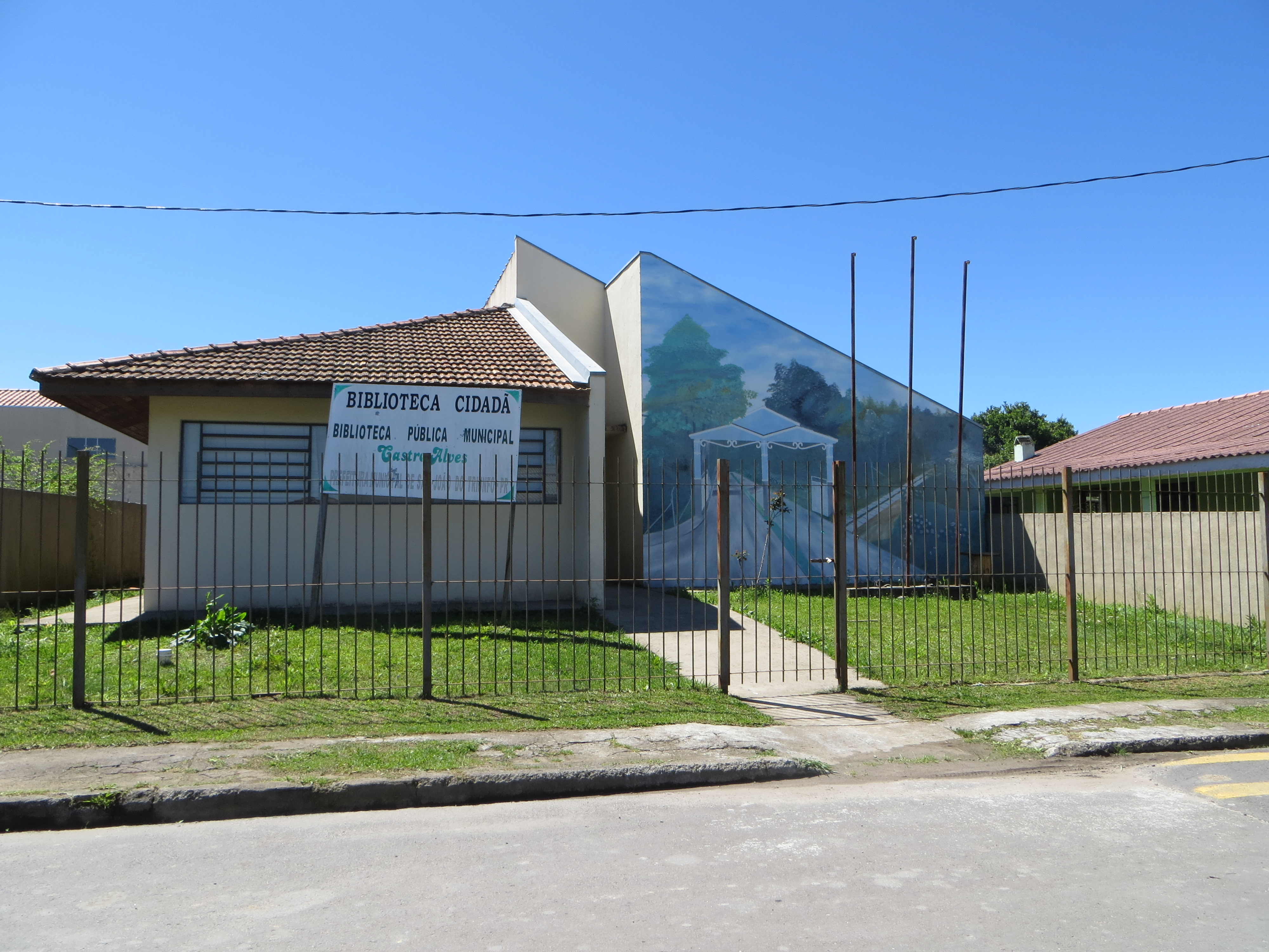 Biblioteca Pública Municipal Castro Alves, em São João do Triunfo, estado brasileiro do Paraná, região sul do país.